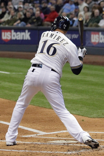 Aramis Ramírez